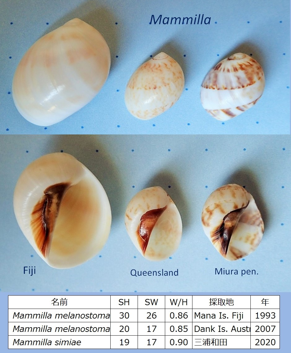 フィジー マナ島・オーストラリア ダンク島のリスガイと三浦半島のネズミガイ。